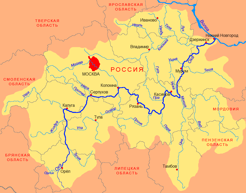 Схема бассейна Оки (приток Волги)